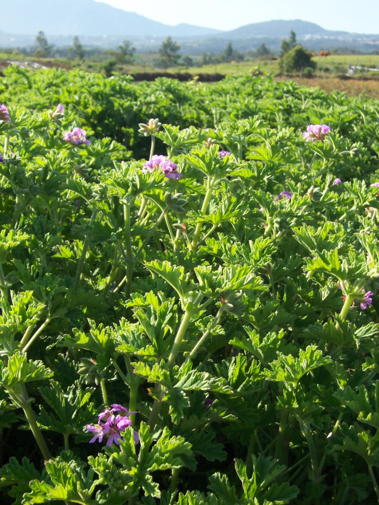 Géranium rosat (Pelargonium graveolens) Photo: B.navez - 11 SEP 2005 - Reunion island